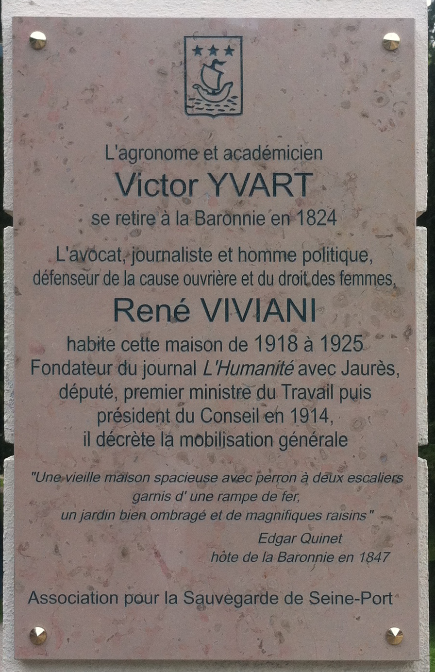 Plaque commémorative Viviani/Yvart posée à l'entrée de la "Baronnie" qui fut sa demeure à Seine-Port